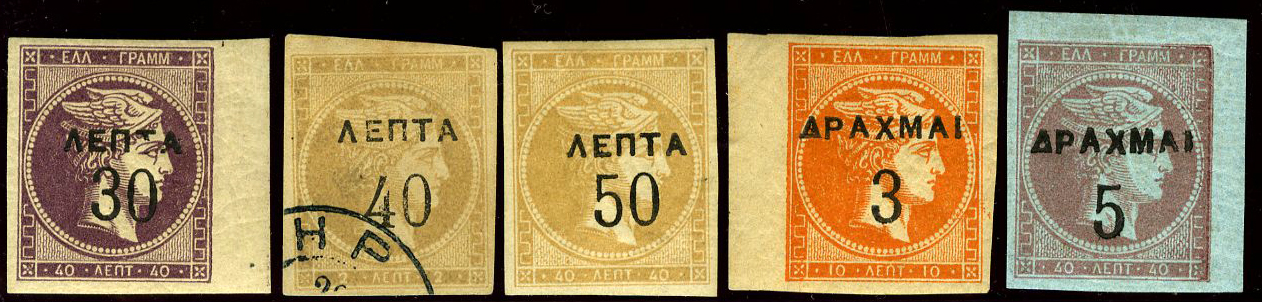 Grosses têtes surchargées - Série courante non dentelées